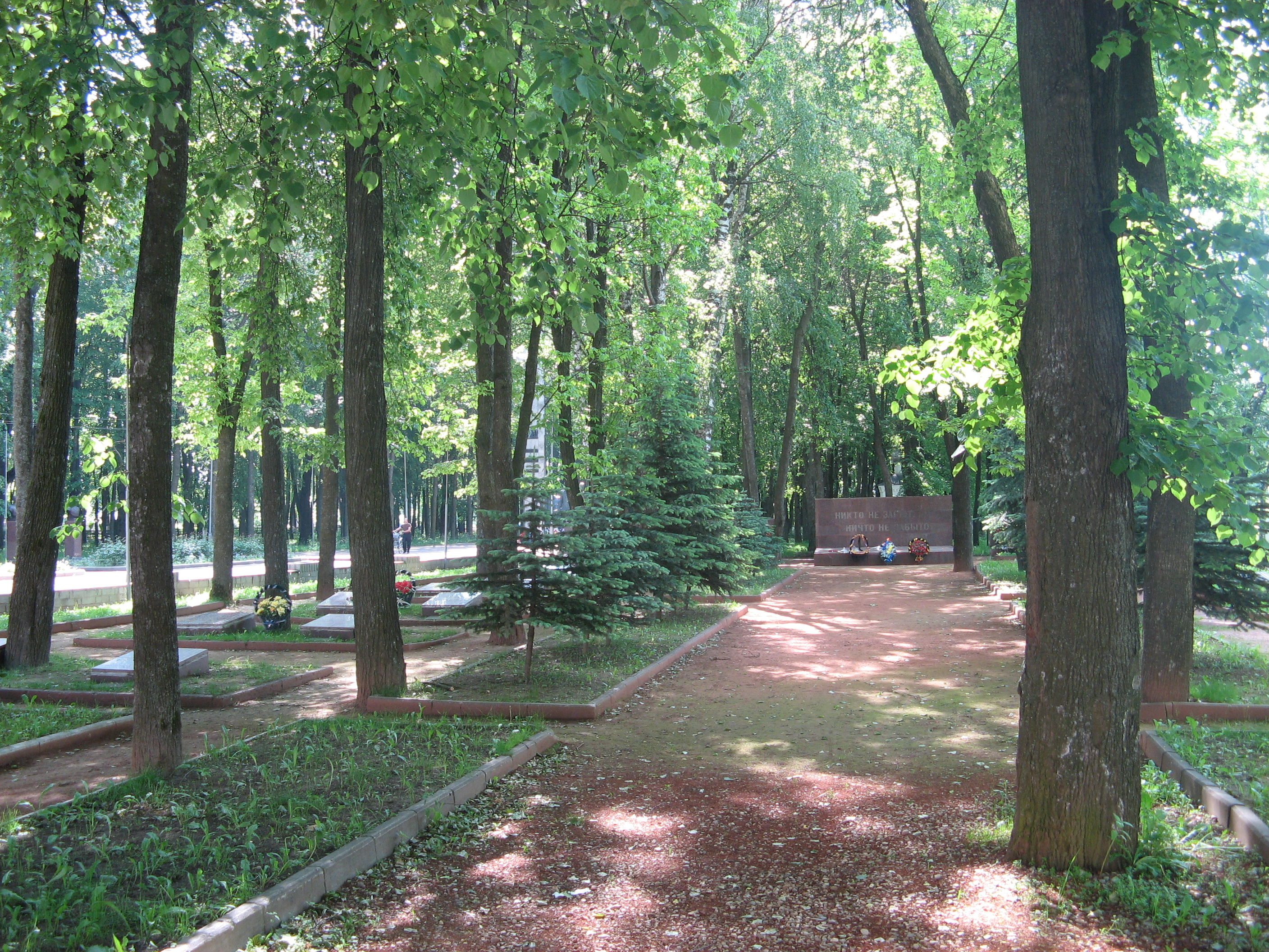 Братская могила 7800 советских воинов в городском сквере Ельни